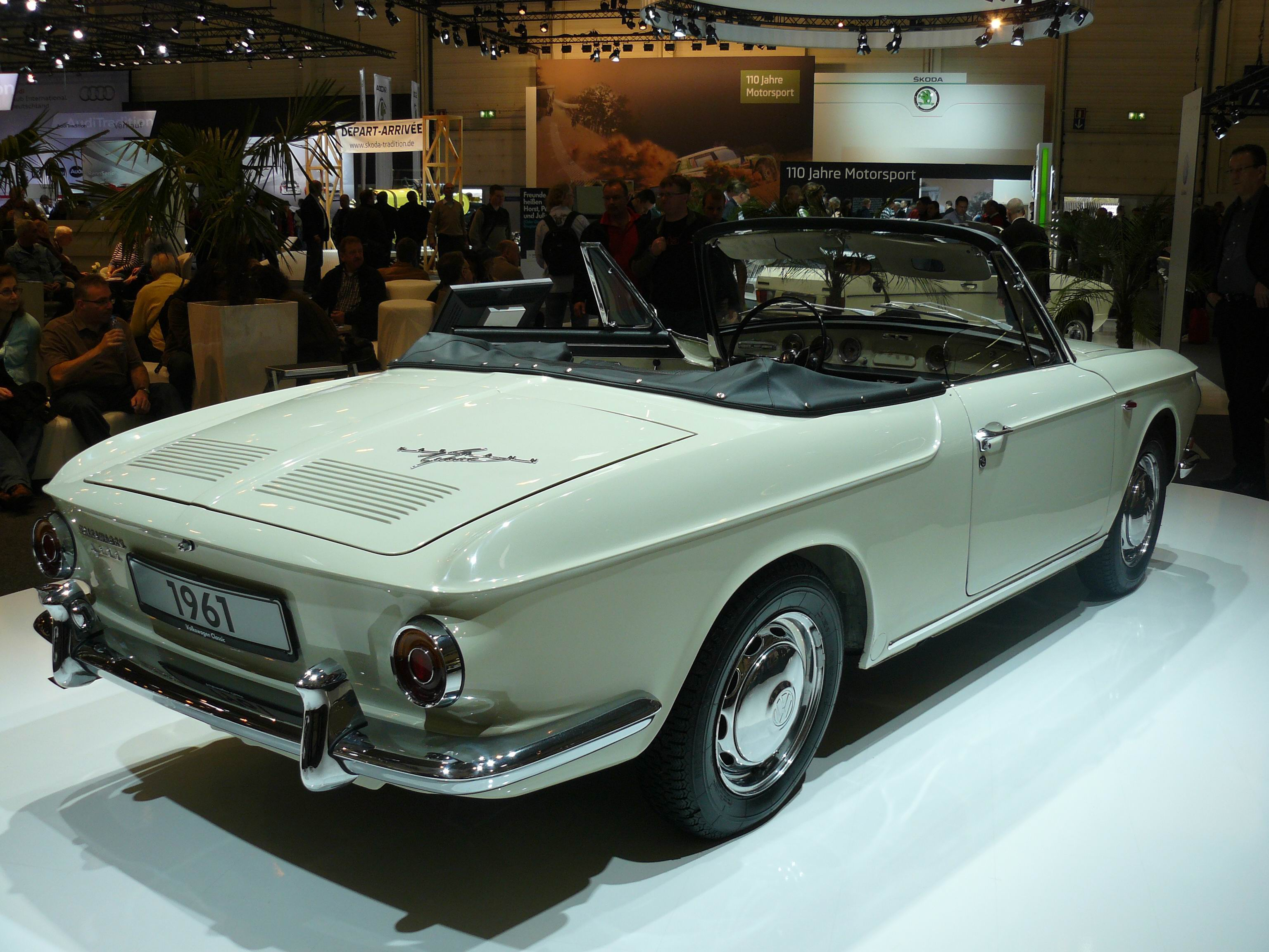 Essen 2011